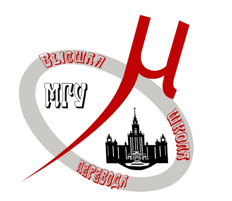 Герб ВШП МГУ